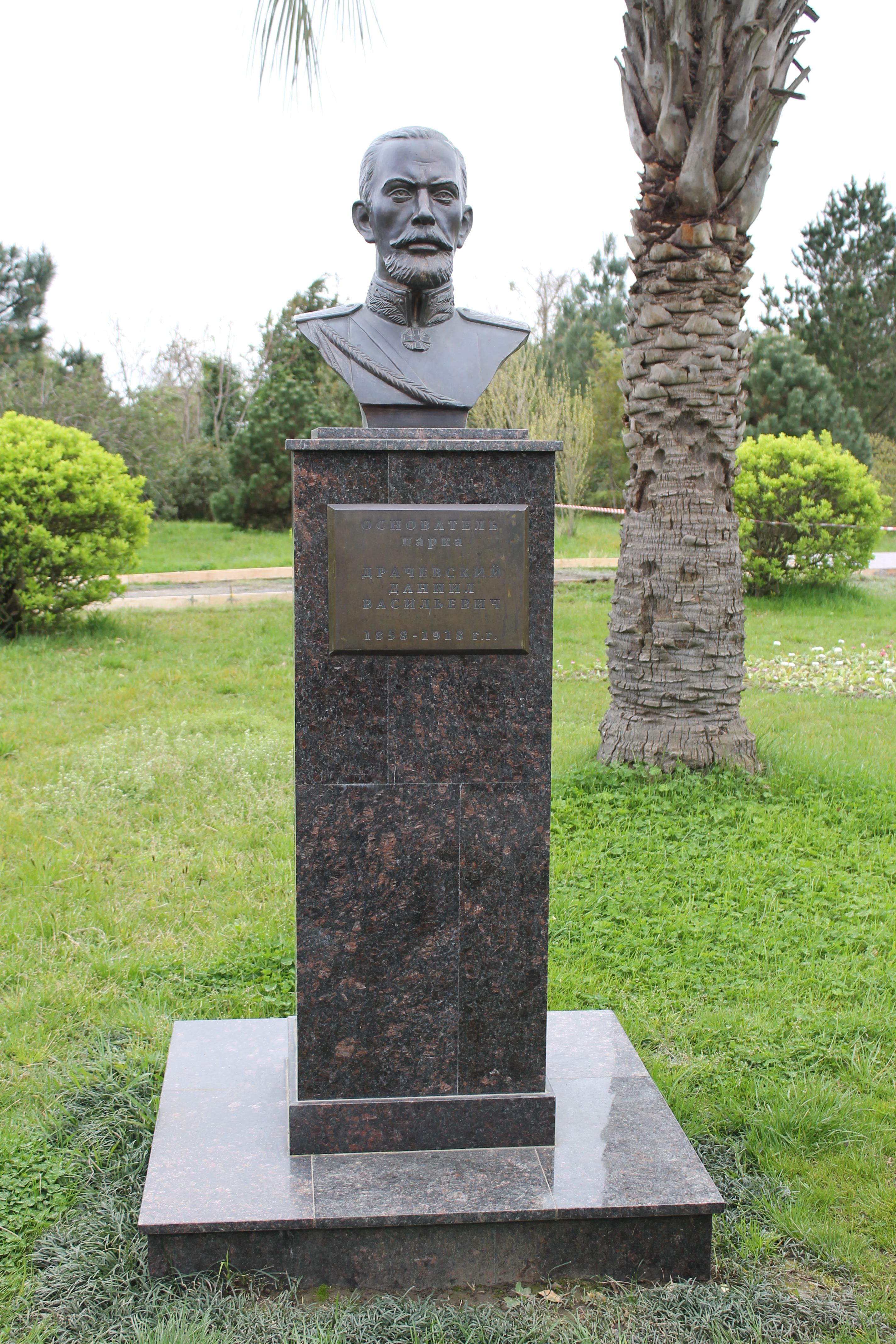 Памятник основателю парка "Южные культуры" в Адлере Даниилу Васильевичу Драчевскому